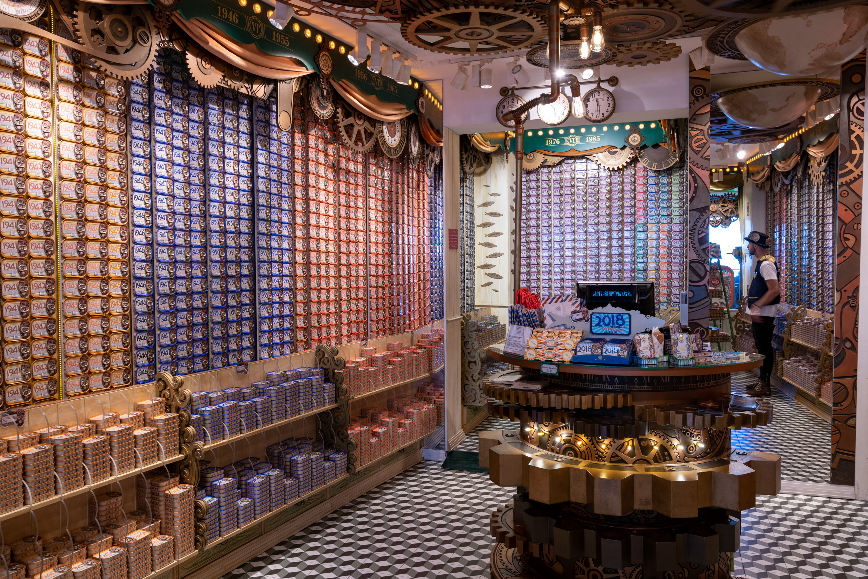 87095-Porto